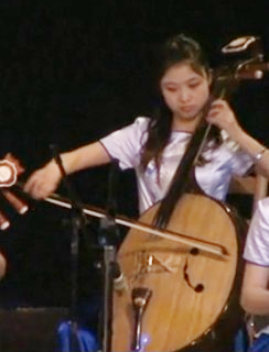 拉阮，阮咸的一种。